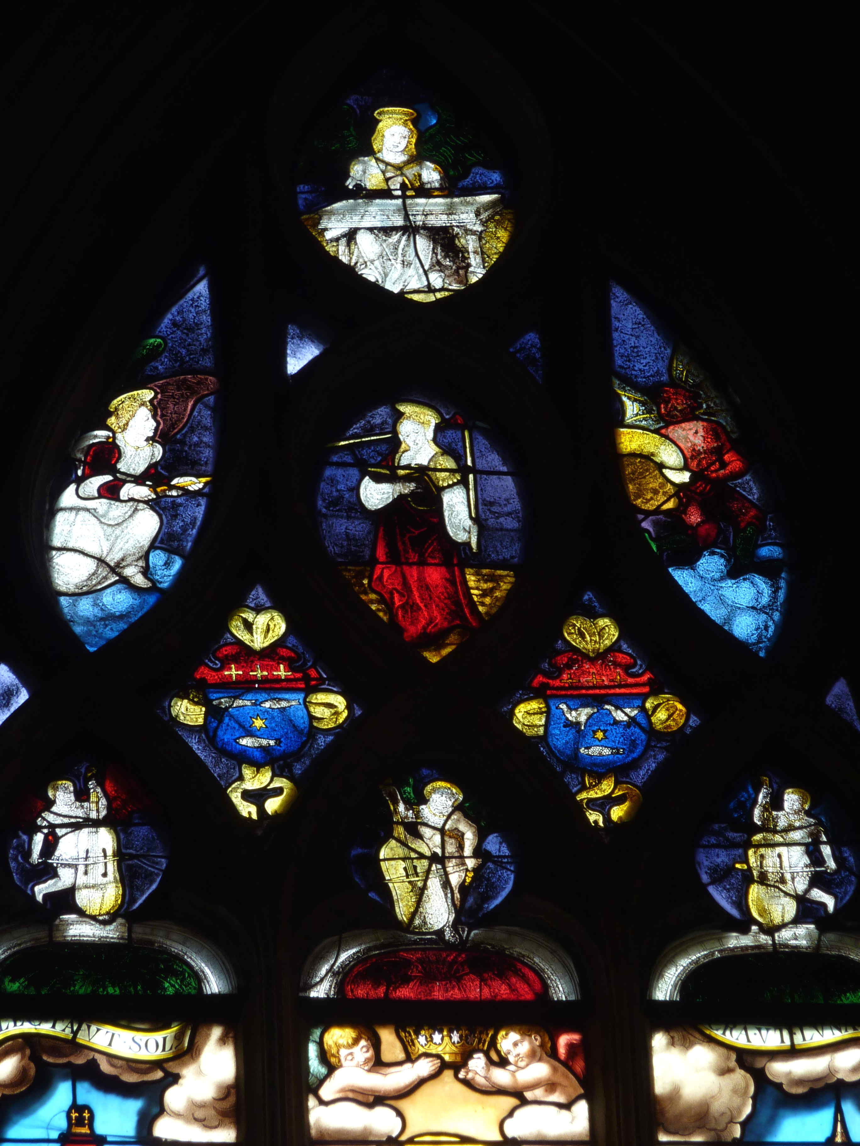 Katholische Pfarrkirche Notre-Dame-des-Marais in La Ferté-Bernard im Département Sarthe (Pays de la Loire/Frankreich), Bleiglasfenster (baie 1) mit Fragmenten um 1533 von François Delalande, Lanzetten von 1883, von Eugène und Ferdinand Hucher, aus der Glasmalereiwerkstatt der Karmeliten von Le Mans (Carmel du Mans), Signatur unten: HUCHER ET FILS; Darstellung: Maria Immaculata, Maßwerk mit Fragmenten um 1533 von François Delalande (Ausschnitt)